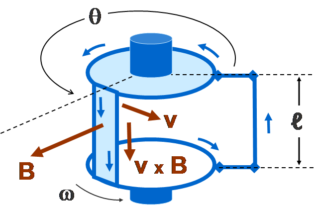 Rotating spindle